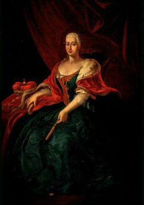 Беларуская (тарашкевіца): Партрэт Ганны Людвікі Радзівіл (Hanna Ludvika Radzivił) з роду Мыцельскіх (Mycielski)